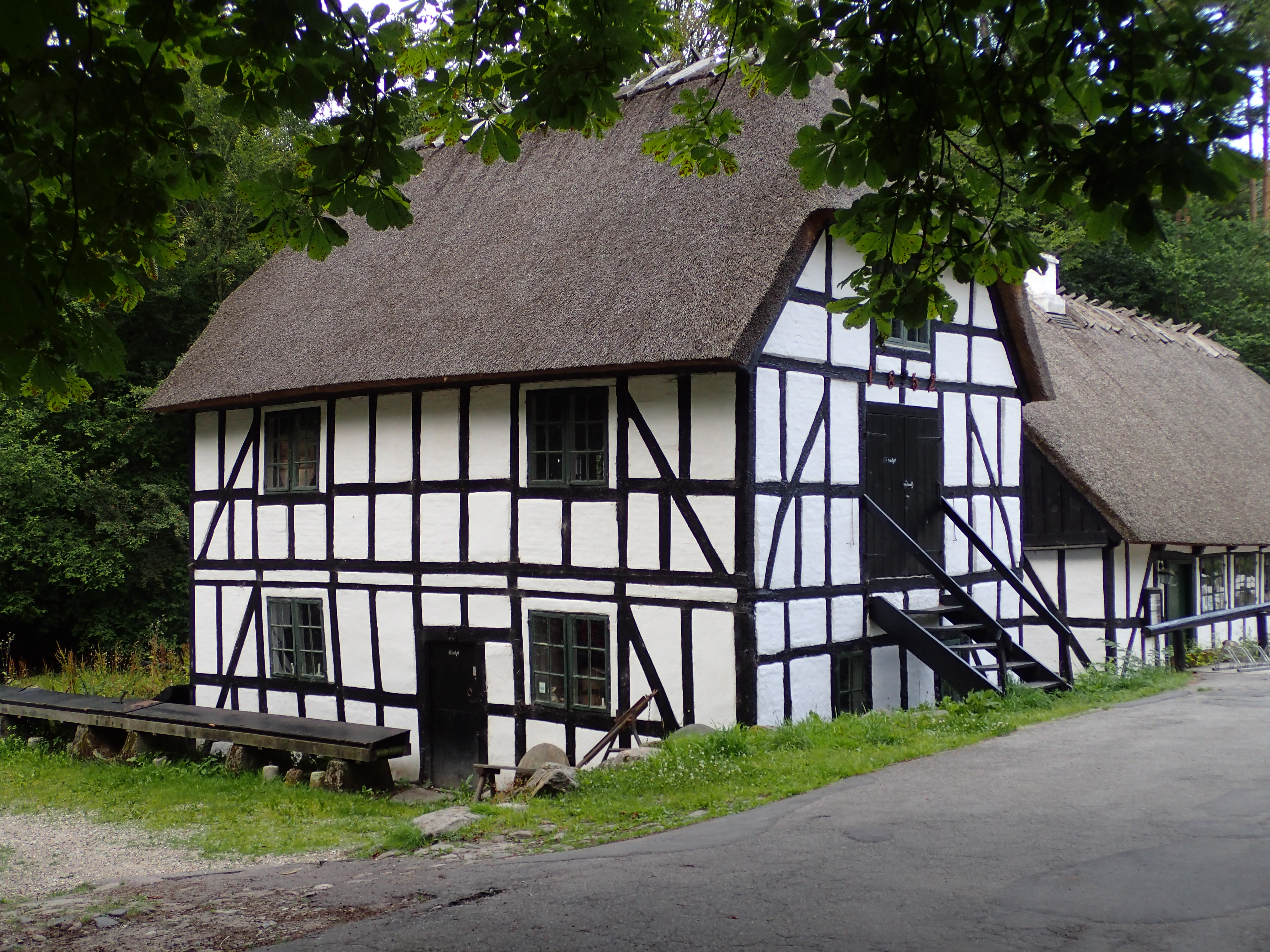 Møllehuset ved Moesgård Skovmølle.